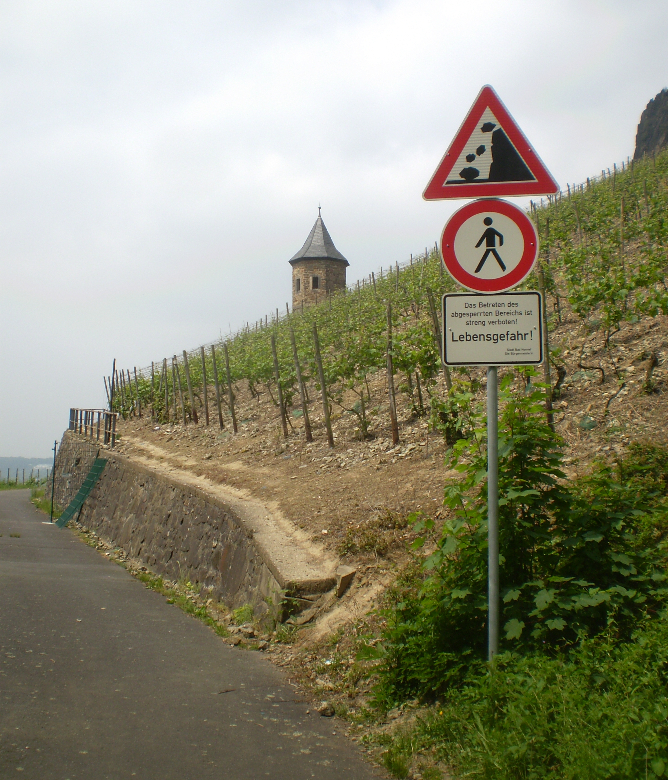 Sperrung eines Weges am Drachenfels in den Weinbergen von Rhöndorf, Bad Honnef